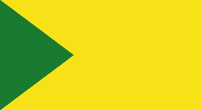 Drapeau du Kata'ib Hezbollah (sans logo)